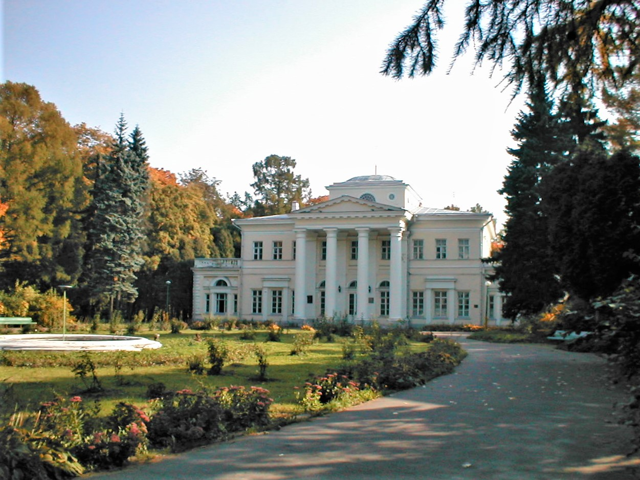 Arch. F. Willster, 1786-1787